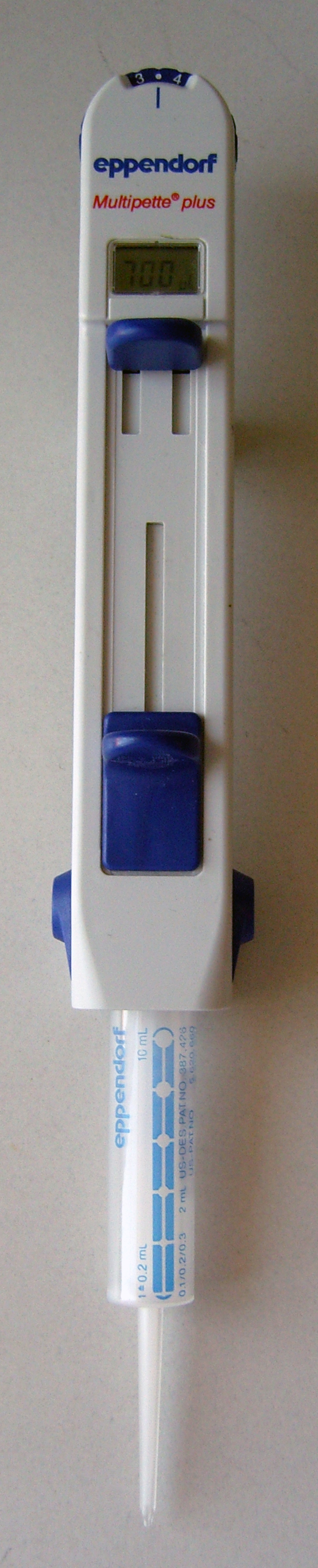 Multipette